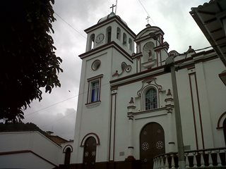 nuestra iglesia municipal